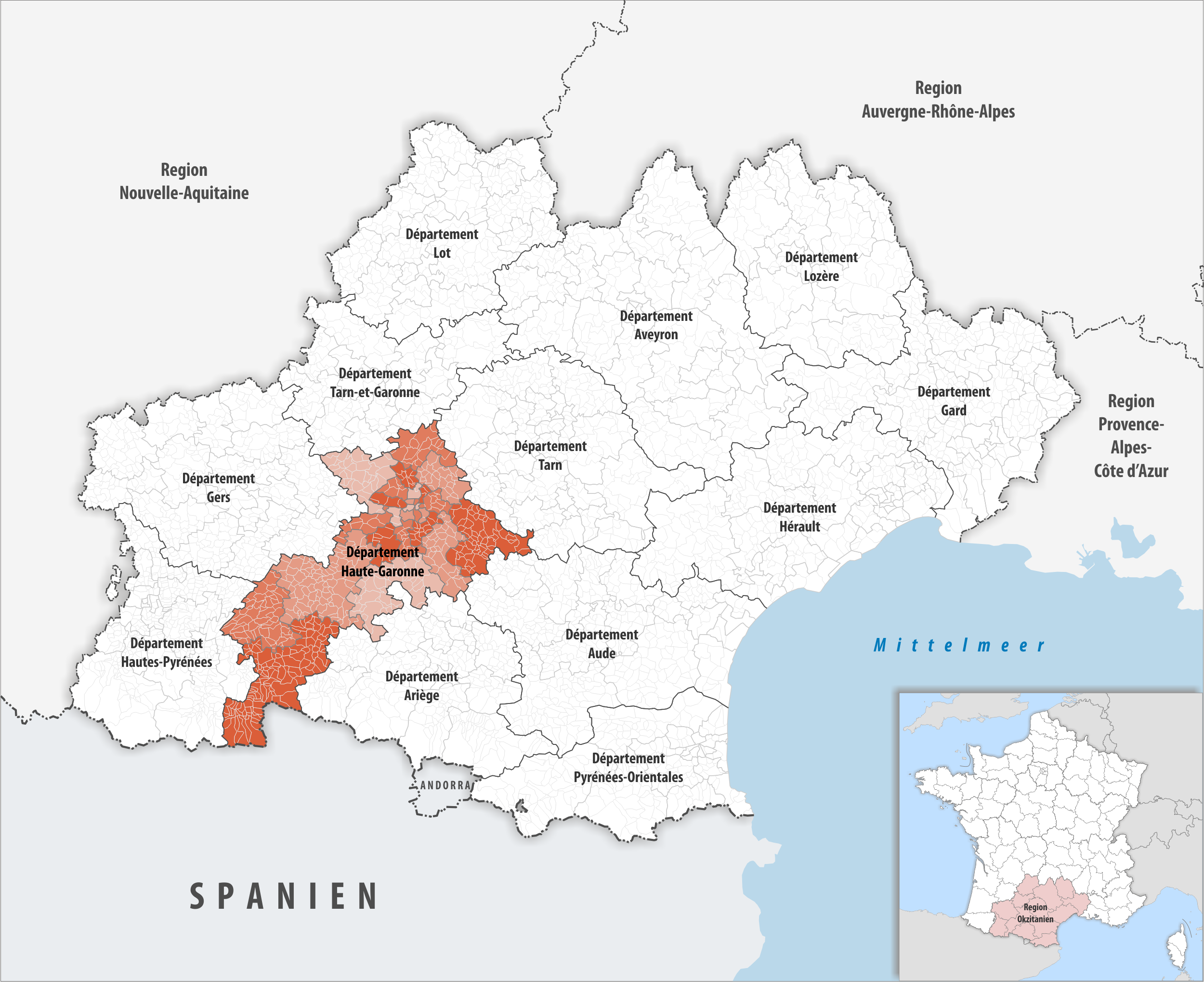 Lage des Departements Haute-Garonne